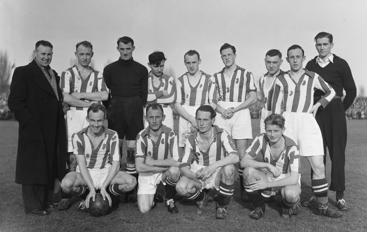 Leeuwarden tegen Heerenveen. Heerenveen elftal.